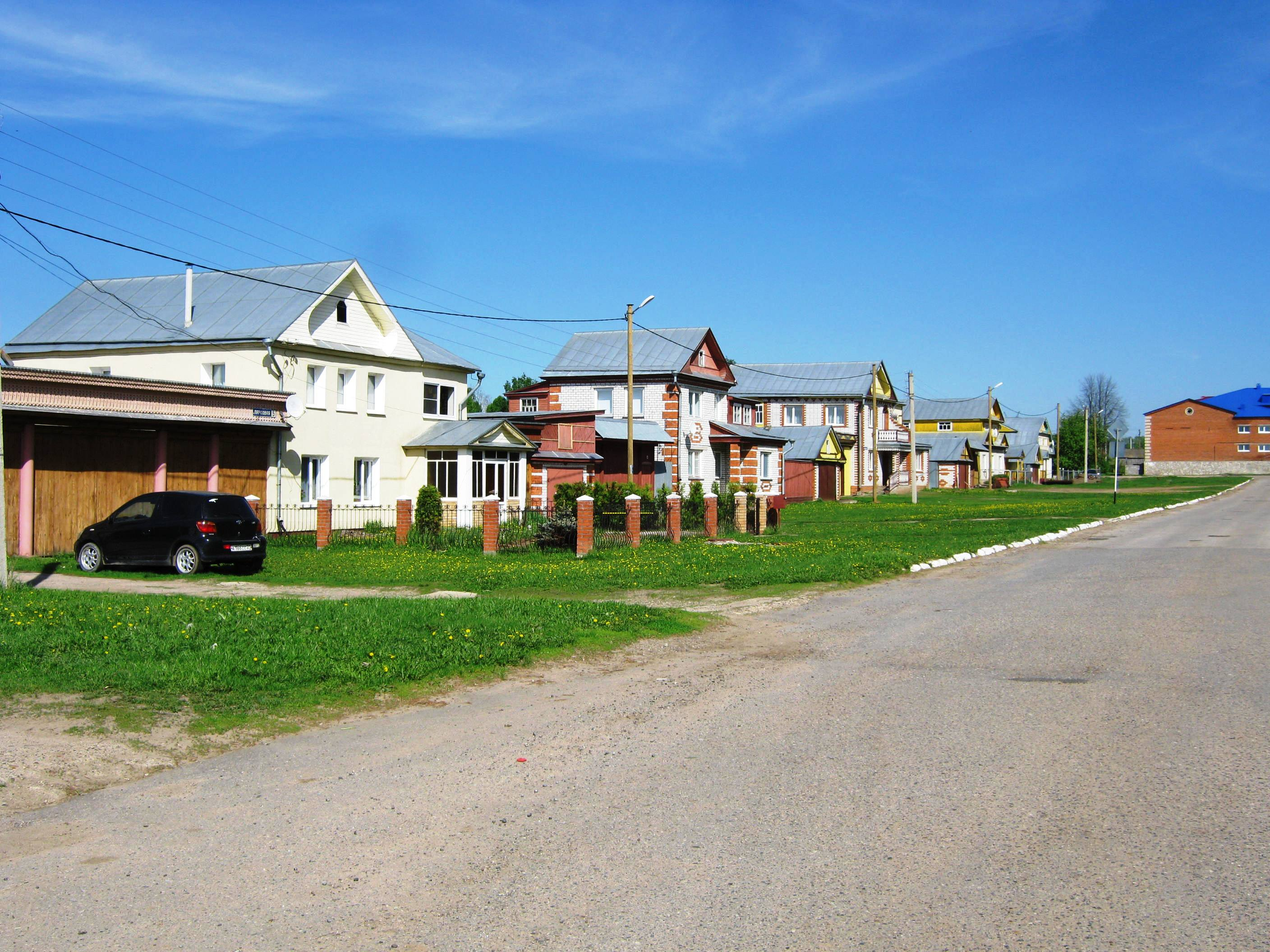 Парковая улица в селе Шоршелы